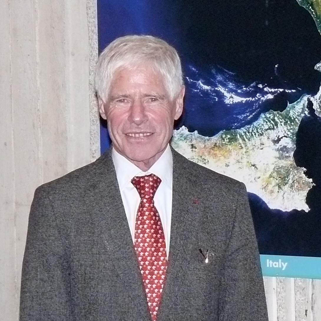 Roger-Maurice Bonnet, lors d'une conférence organisée par le groupe régional Côte d'Azur de l'association aéronautique et astronautique de France, à Cannes